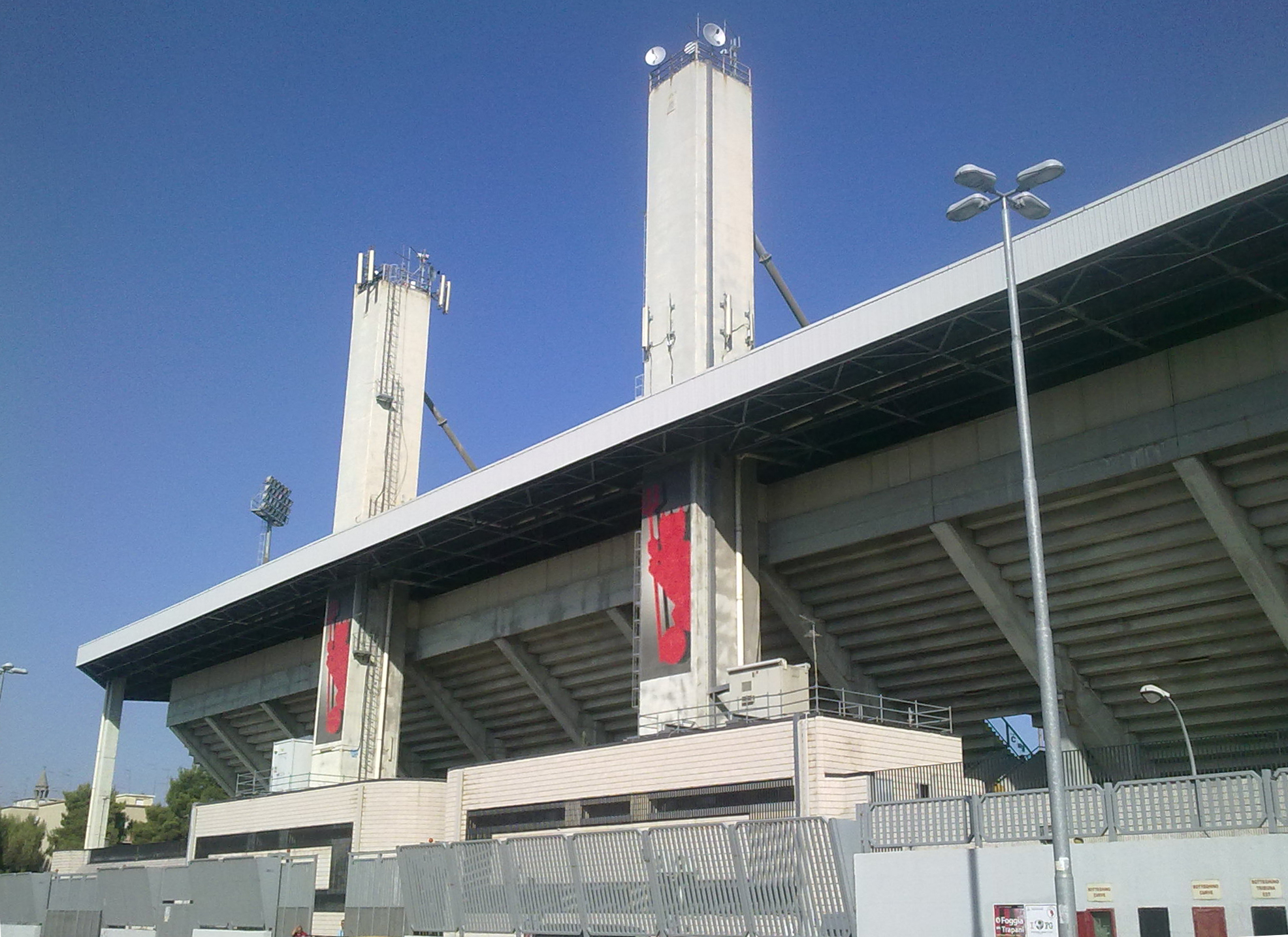 Stadio Pino Zaccheria in Foggia, Italy